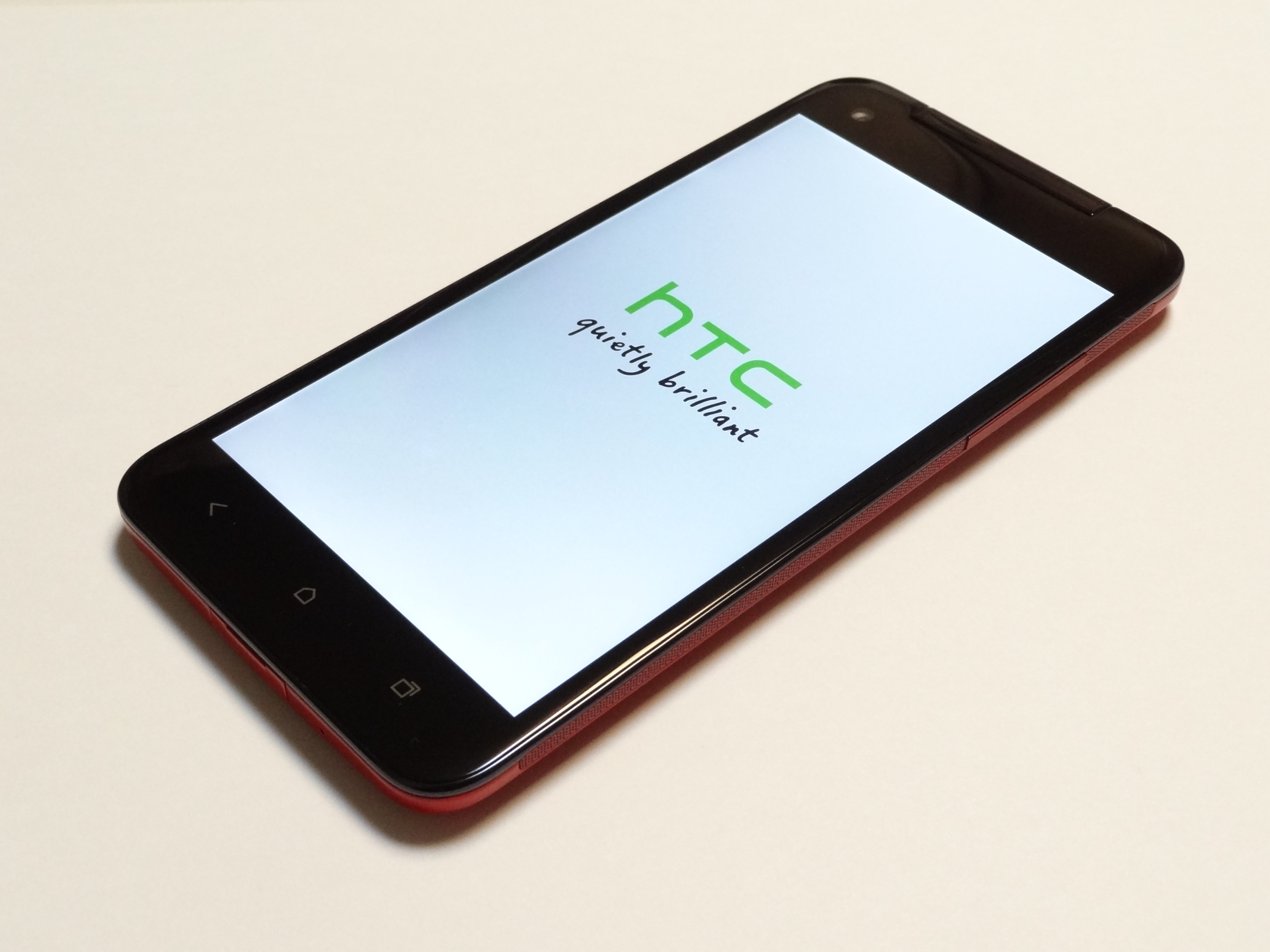 au by KDDIの第4世代移動通信システム（4G LTE）対応スマートフォン、「HTC J butterfly HTL21」の画面側の写真です。平成24(2012)年12月10日撮影。